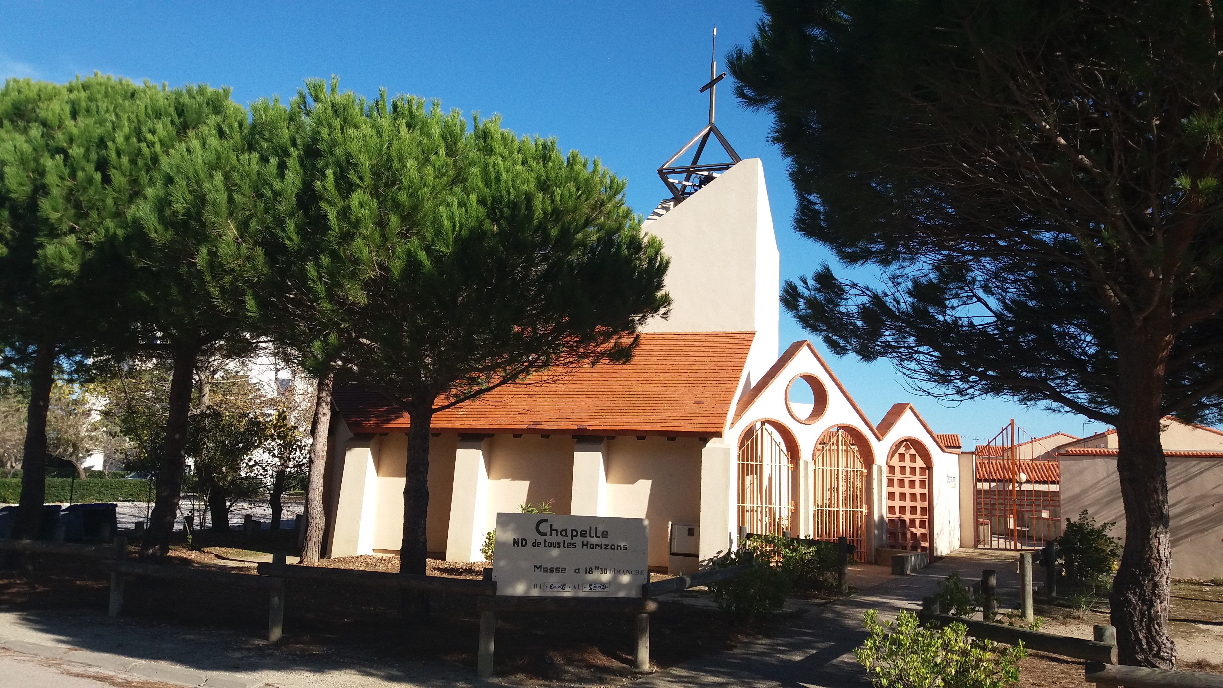 El Barcarès- Nostra Senyora de Tots els Horitzonts